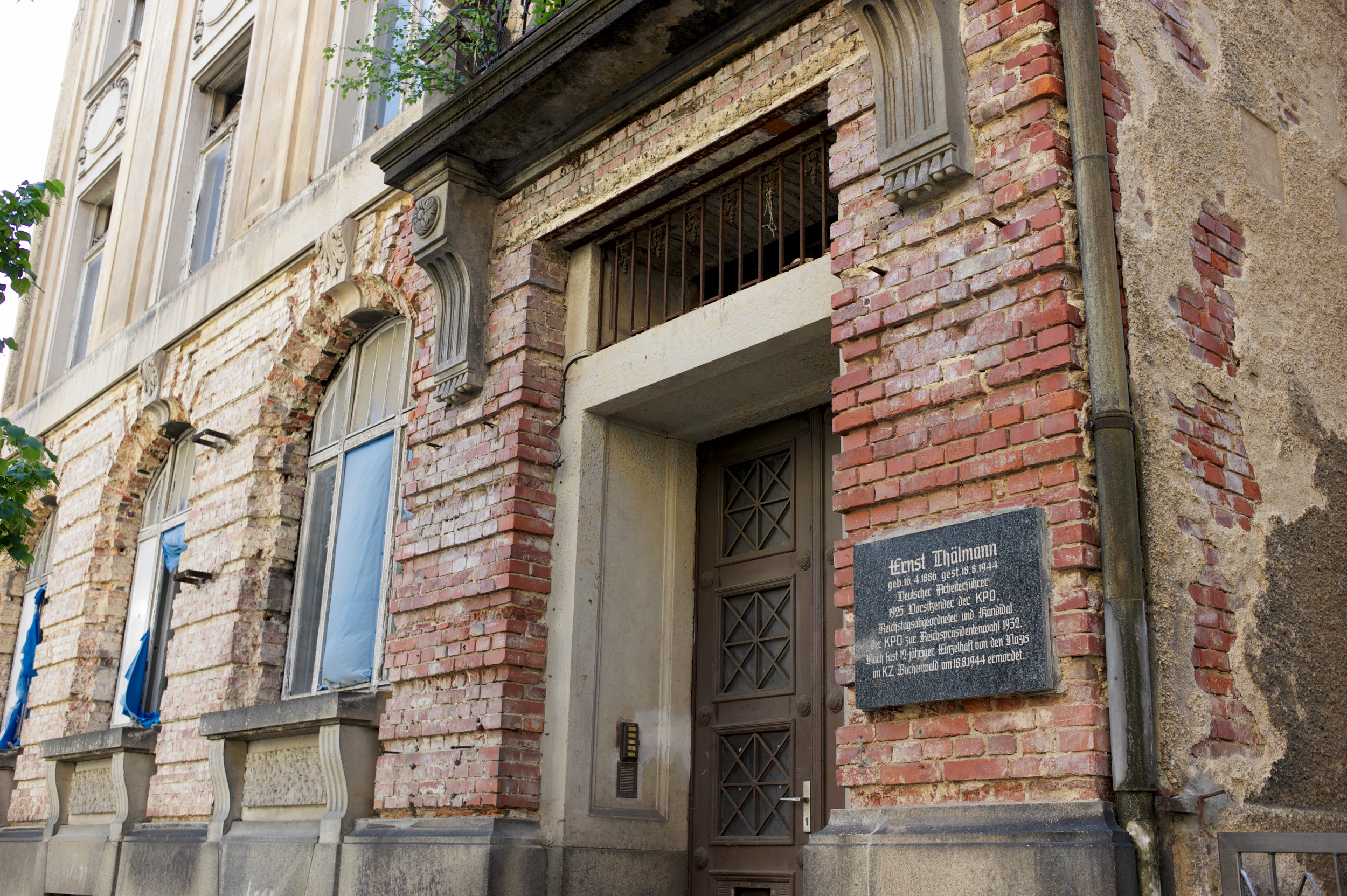 Gedenktafel für Ernst Thälmann in Greiz